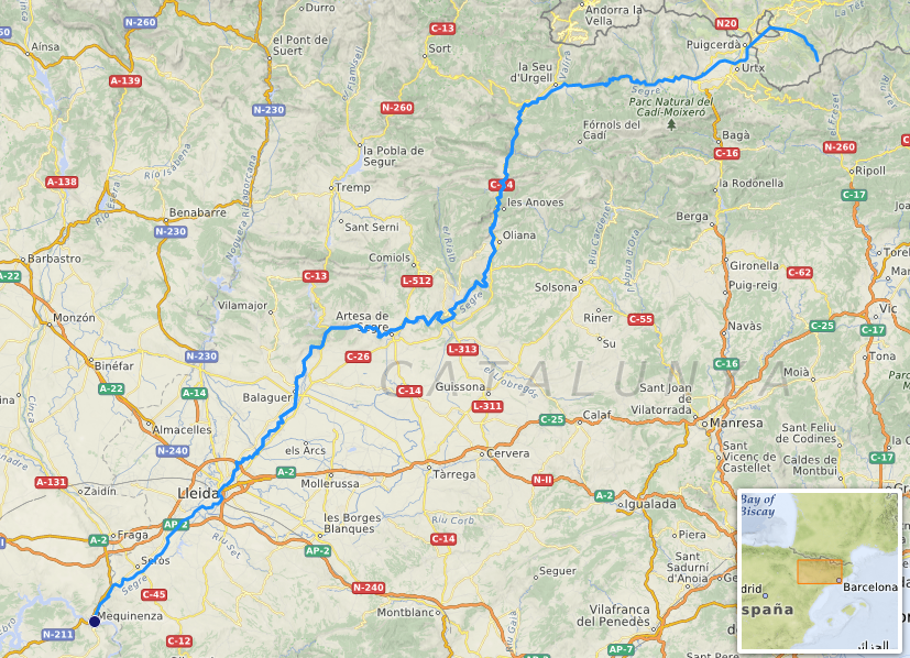 carte réalisée sur umap, [1] This map may be incomplete, and may contain errors. Don't rely solely on it for navigation.